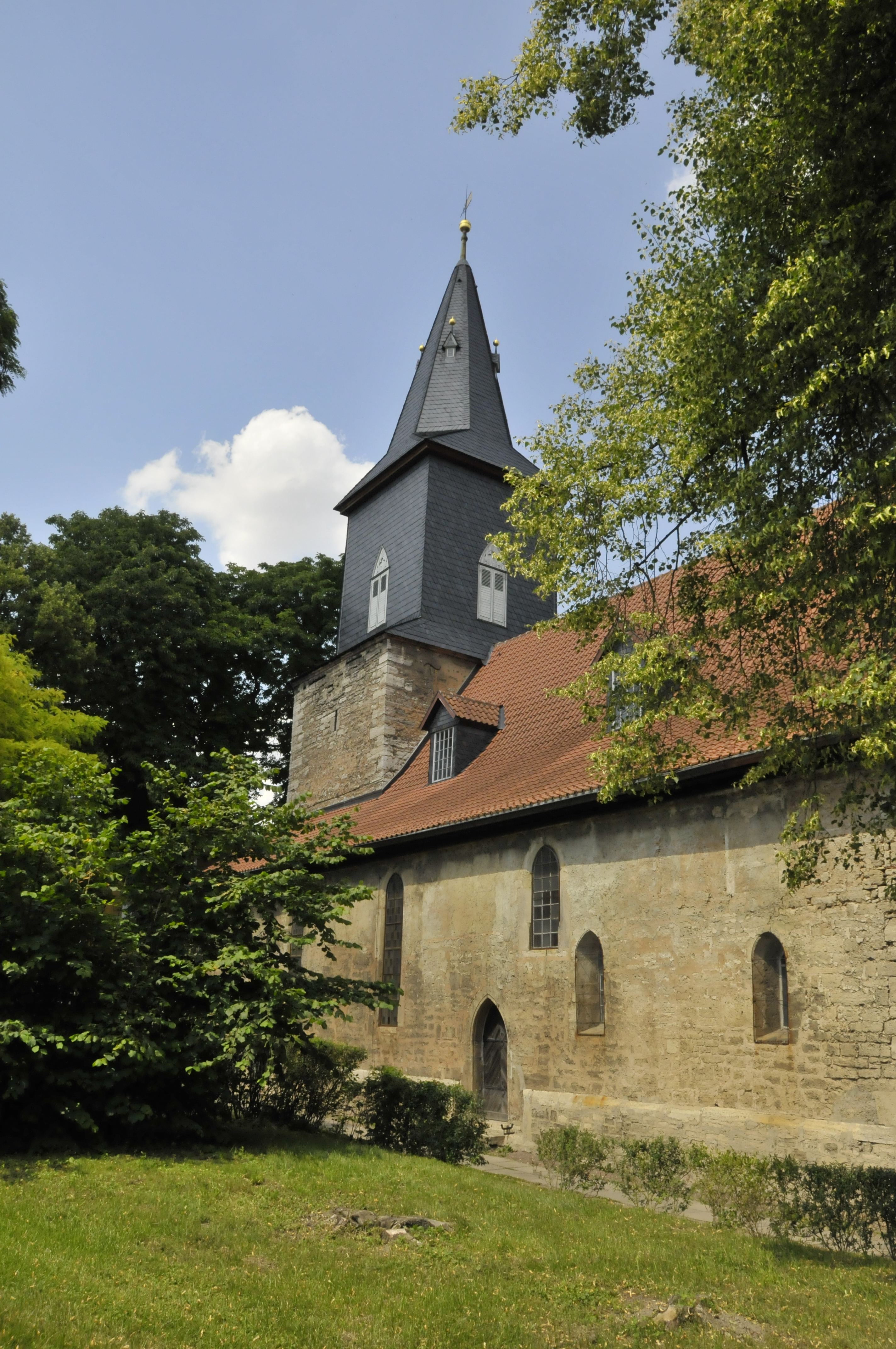 Clingen, Kirche